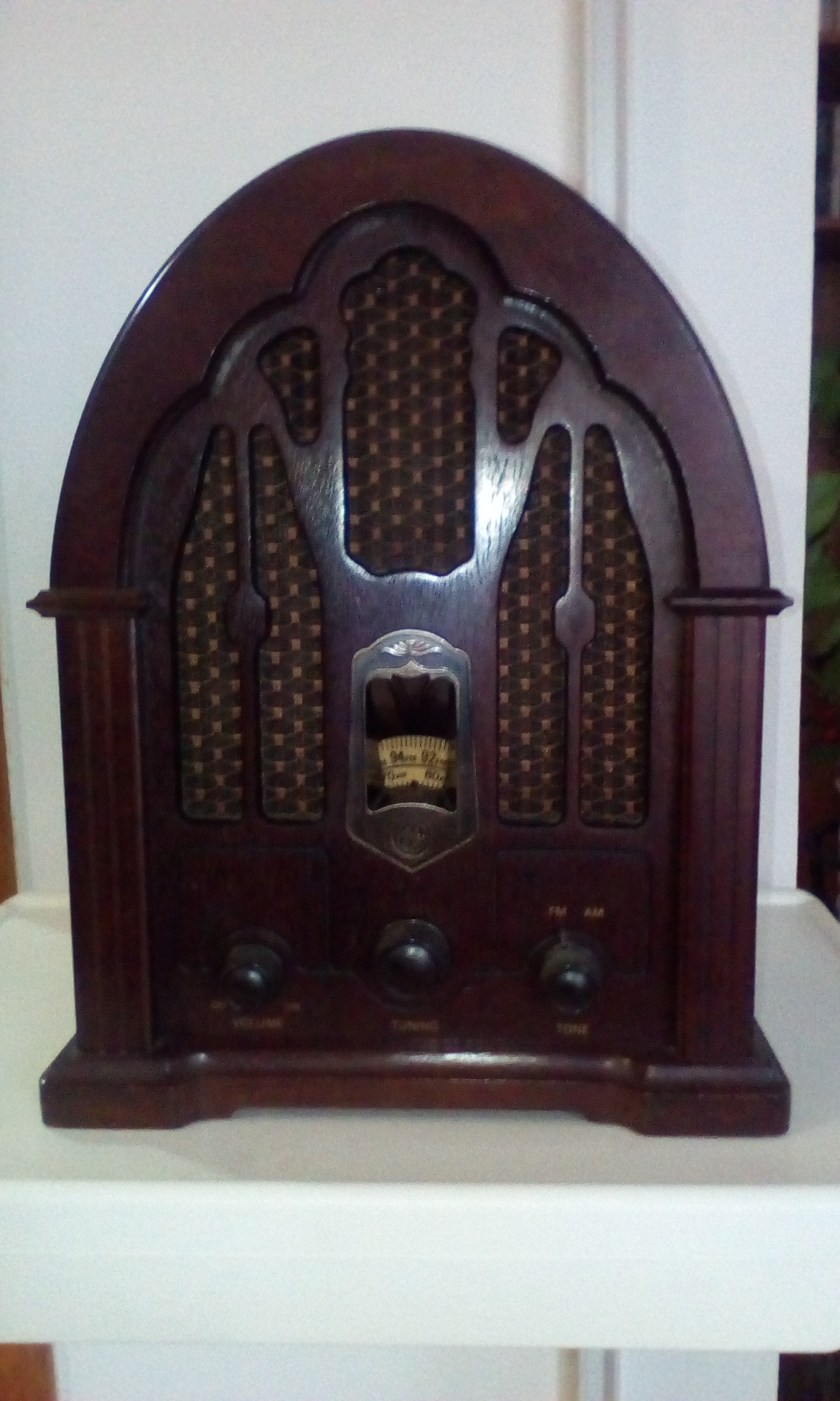 ραδιόφωνο αντίκα με λυχνίες